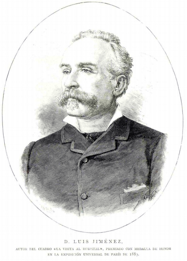 Don Luis Jiménez.